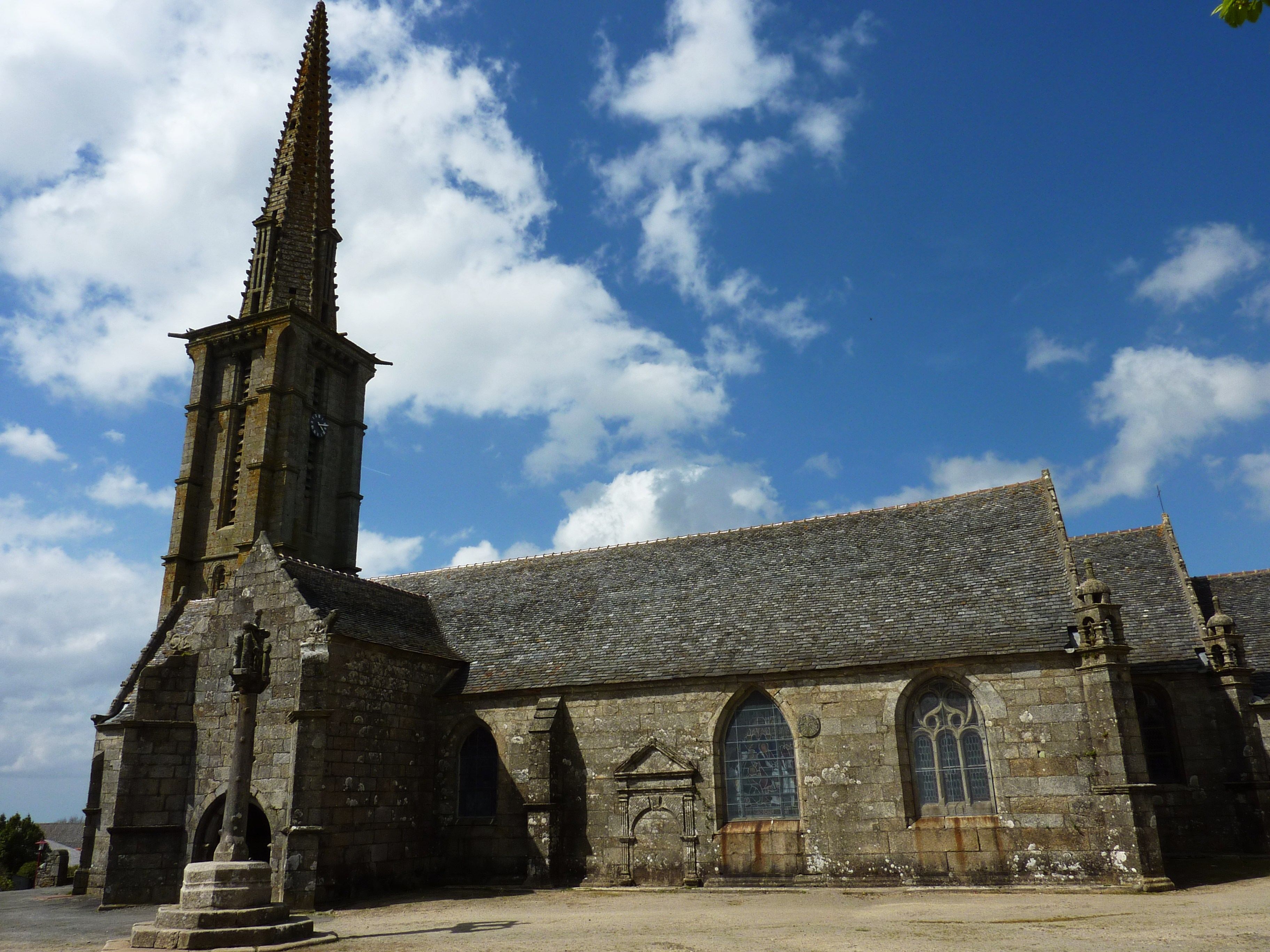 Eglise paroissiale Saint-Yves de Plounéour-Menez 2